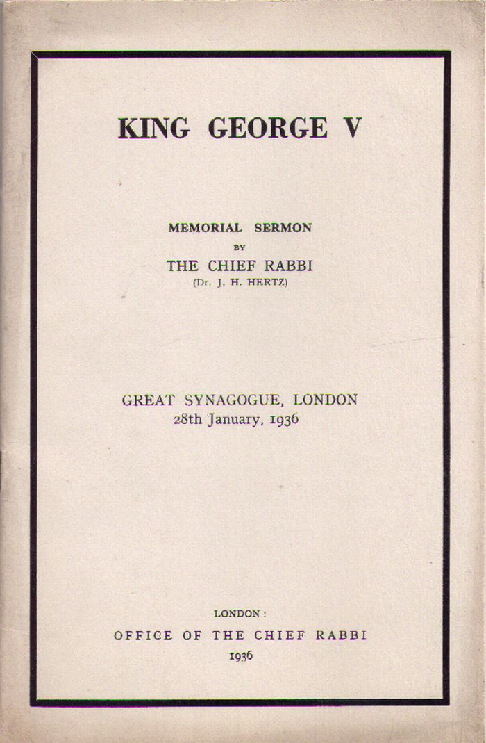 Eulogy for the King George V